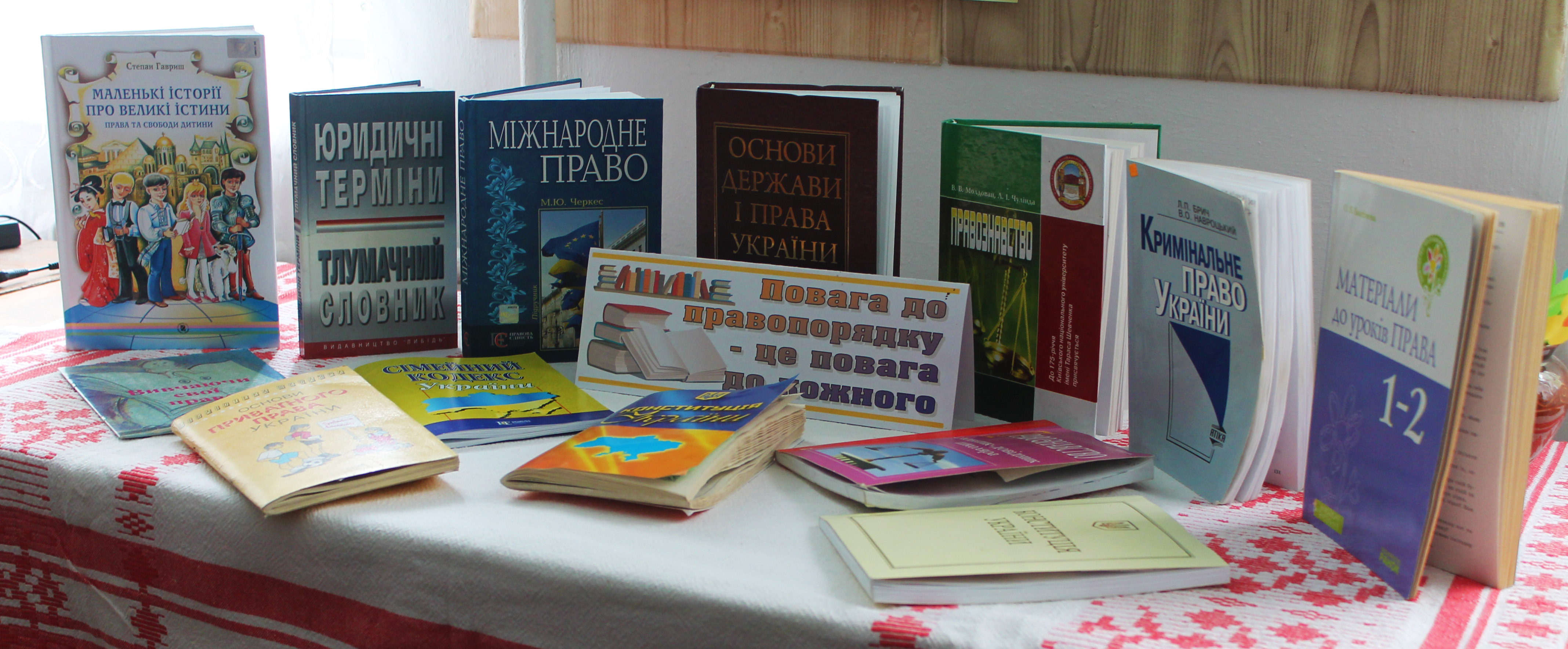 Хмельницька міська ЦБС бібліотека-філія №9